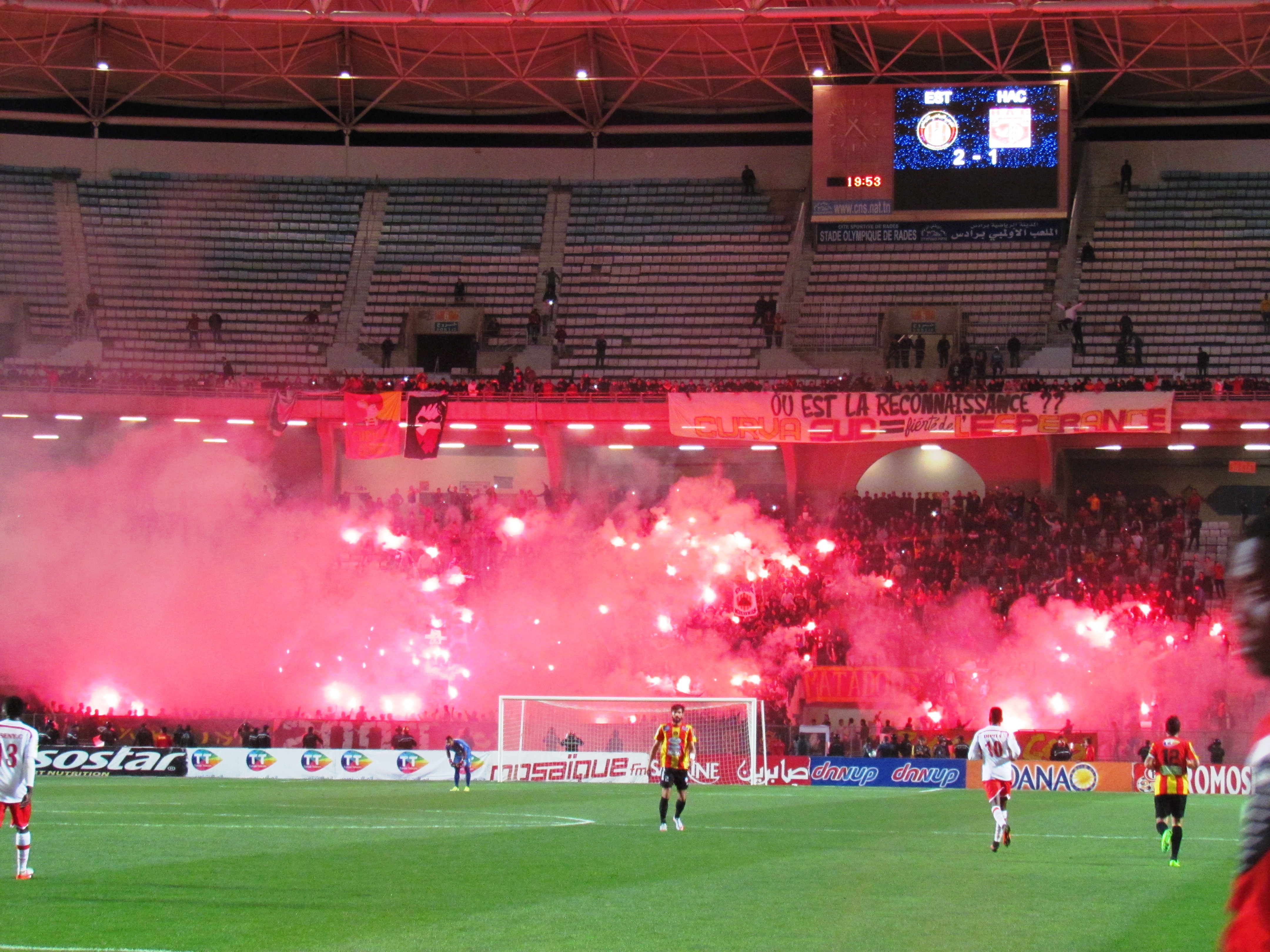 Craquage des Ultras de l'Espérance Sportive de Tunis lors de la rencontre de la Ligue des Champions entre l'EST et le Horoya Conakry (Guinée) le 11 mars 2017